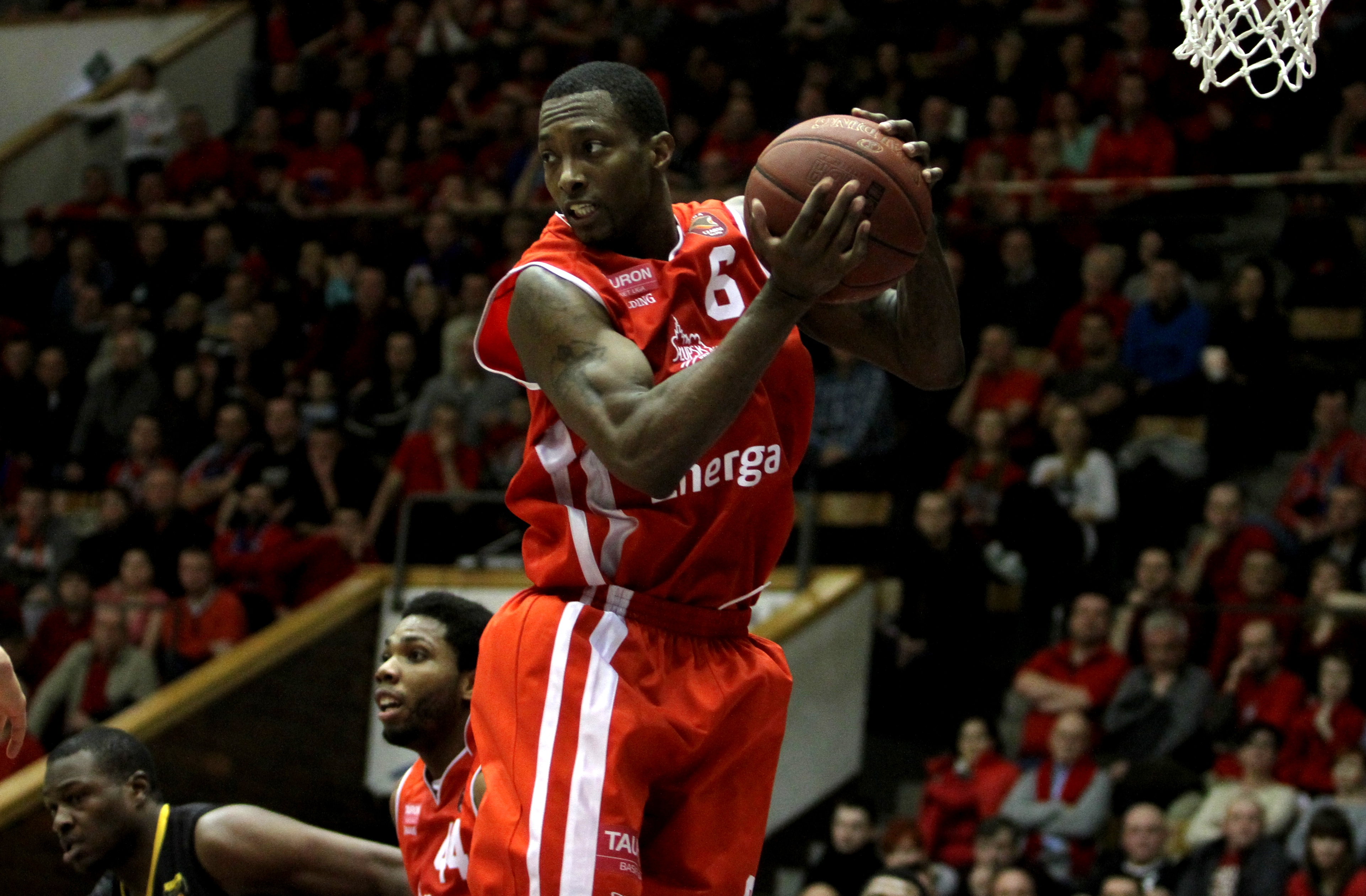 Rodderick Trice, Energa Czarni Słupsk